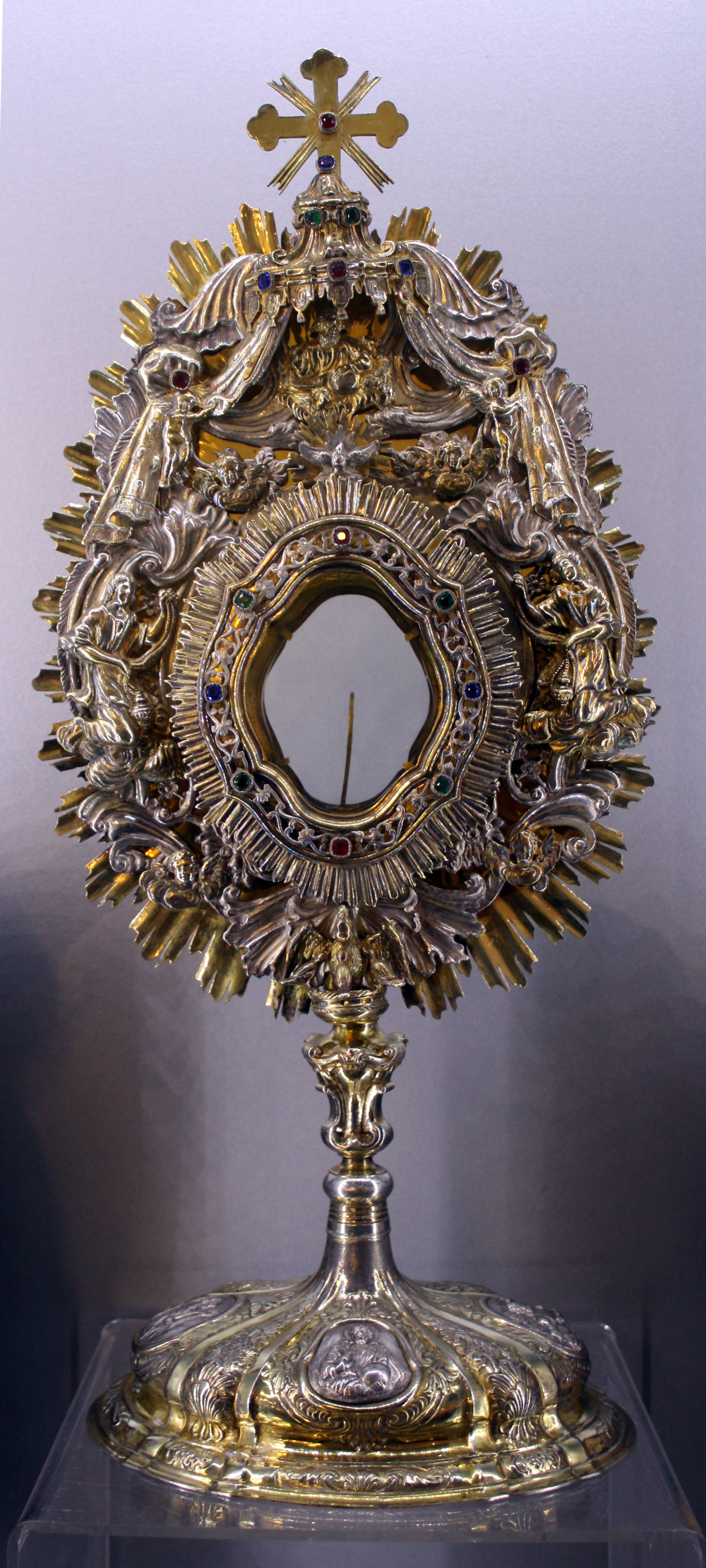 Hürth-Kendenich St. Johann Baptist. Barocke Monstranz aus Messingsilber (1747), hergestellt bei Apolonia Tapperts im Köln